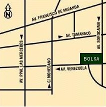 Croquis de ubicación de la Bolsa de Valores de Caracas en la urbanización El Rosal, Caracas.